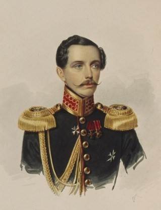 Михаил Васильевич Пашков (1802—1863) Lieutenant-General Mikhail Pashkov